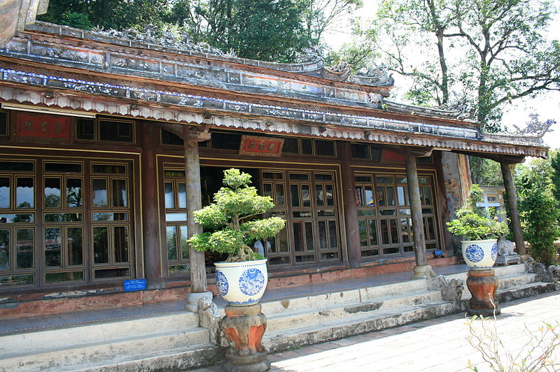 Thể loại:Hình truyền lên bởi thành viên Lưu Ly